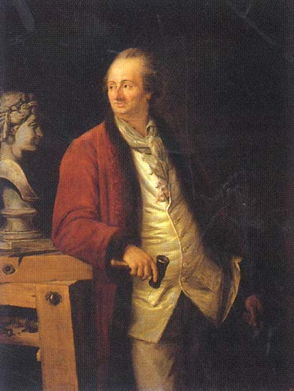 Nicolas-François Gillet. Жилле Никола-Франсуа. ГРМ